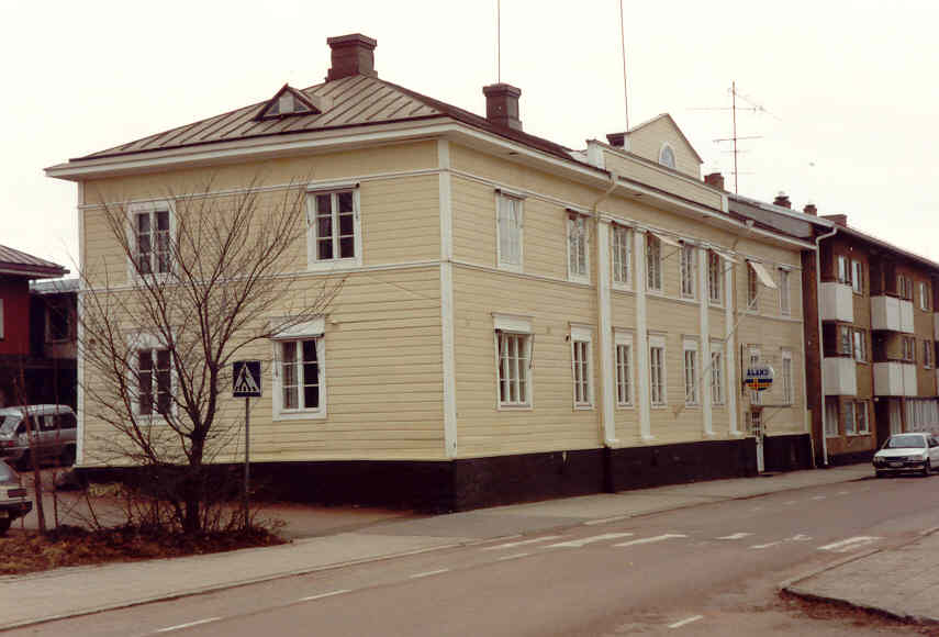 Tidningen Ålands byggnad vid Strandgatan 16 i Mariehamn. En bild tagen våren 1991 av Harri Blomberg.